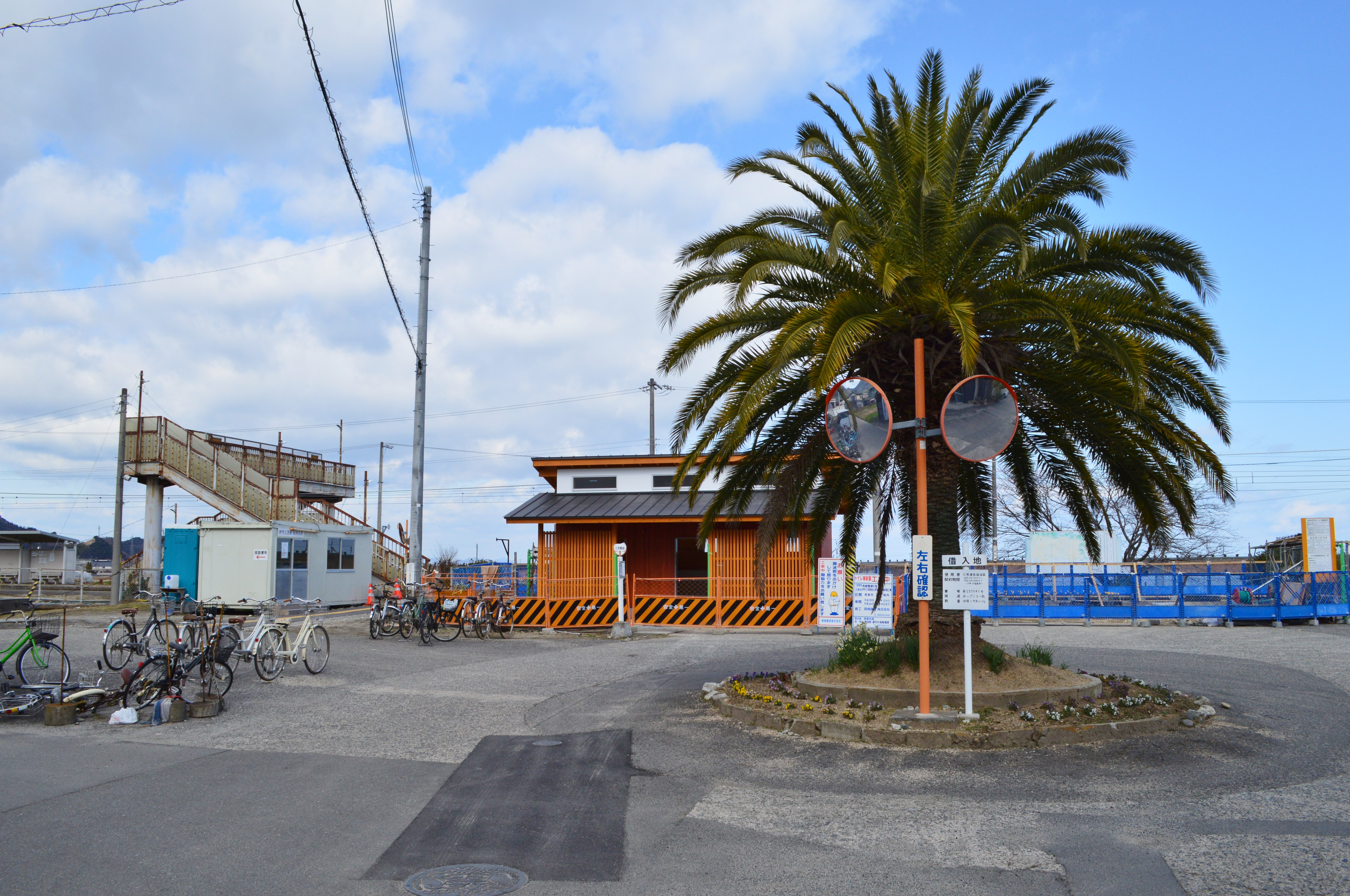 伊予三芳駅 駅前